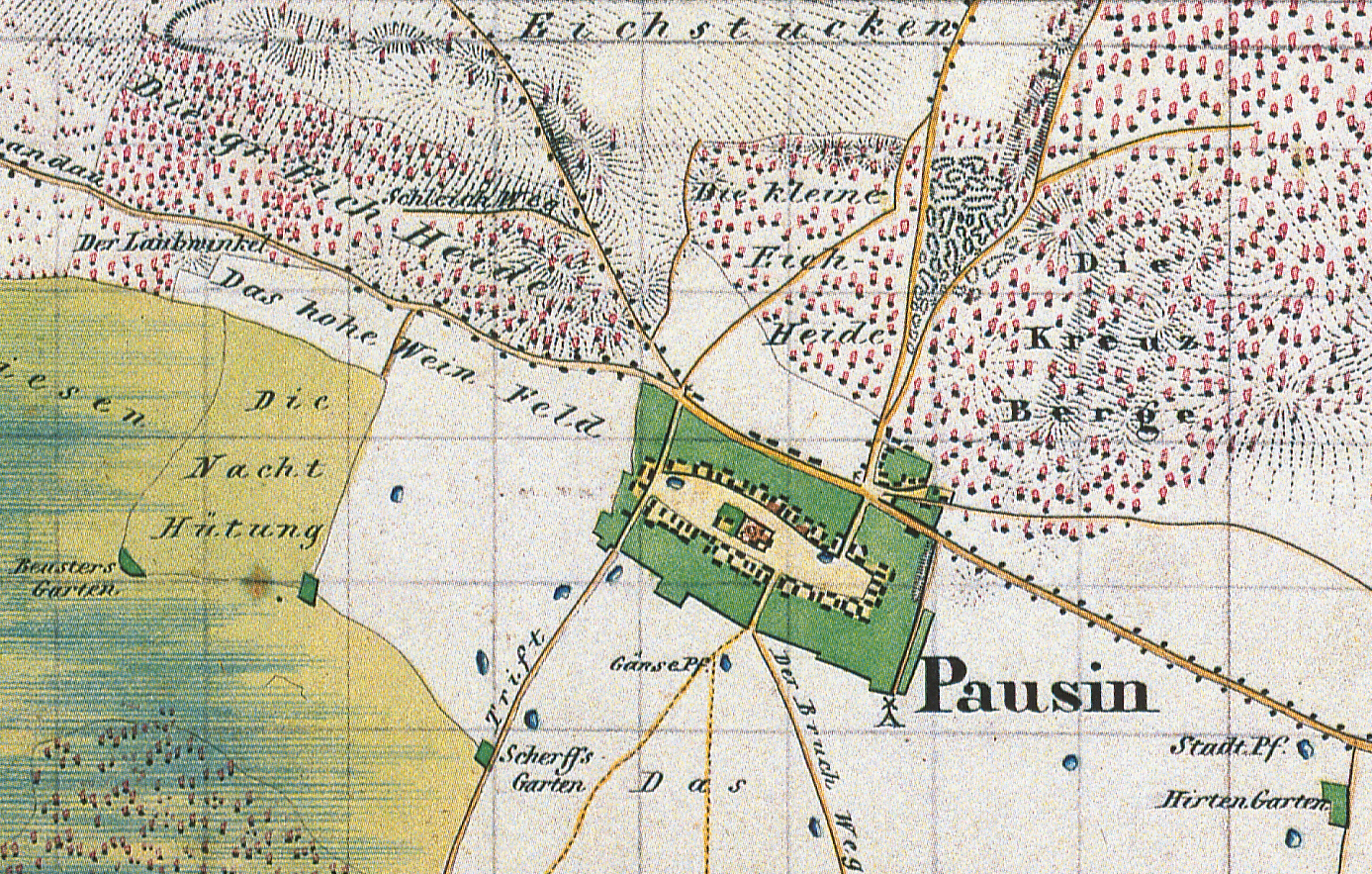 Pausin, Ortsteil der Gemeinde Schönwalde-Glien, Landkreis Havelland, Brandenburg, Ausschnitt aus dem Urmesstischblatt 3344 Bötzow von 1839